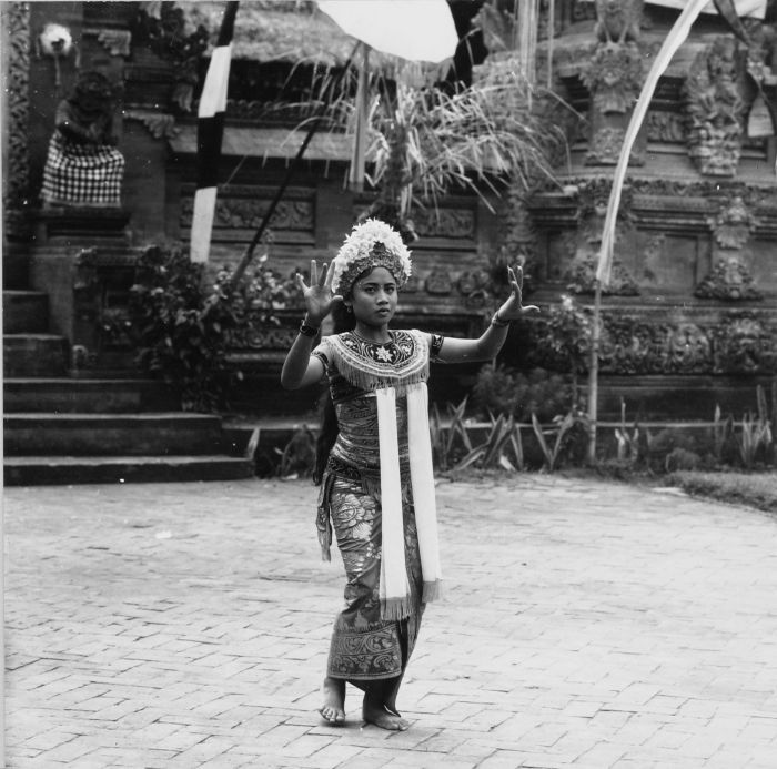 Negatief. De dienares van Rangda in een Barong- en Krisdans in het voorhof van de dorpstempel